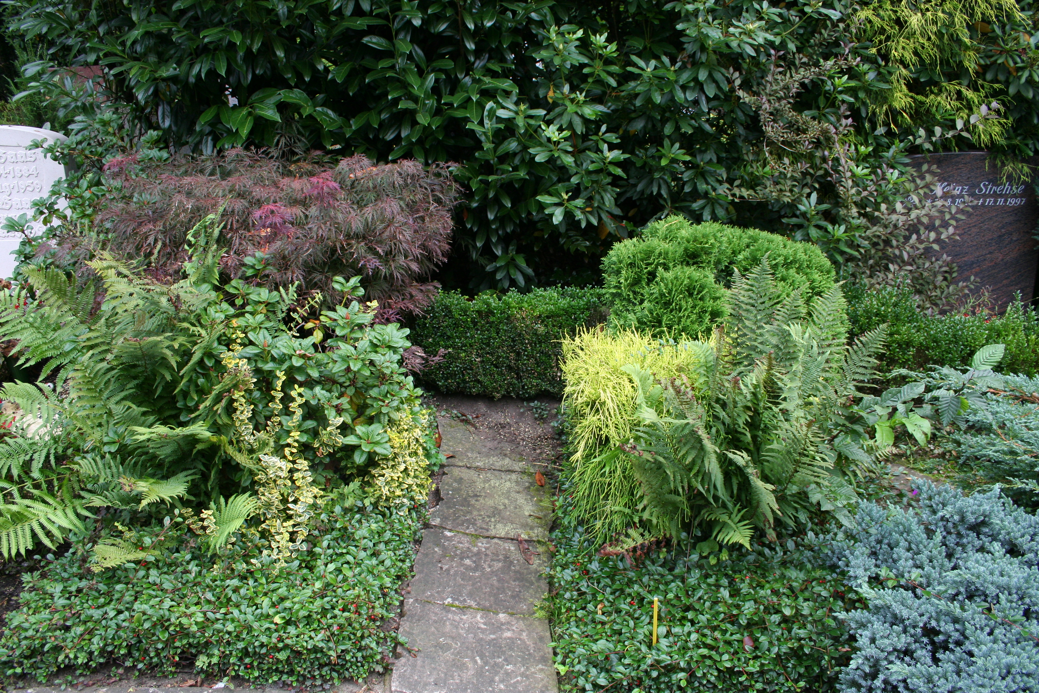 Günther Jerschke wurde am 8. Oktober 1921 in Breslau geboren